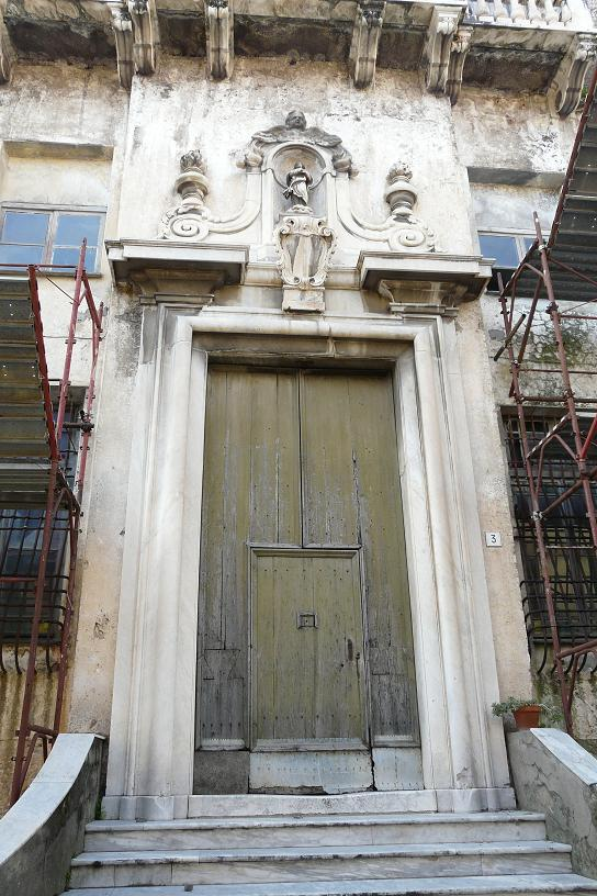 Palazzo Curlo poi Spinola, Centro storico di Taggia, Liguria, Italia